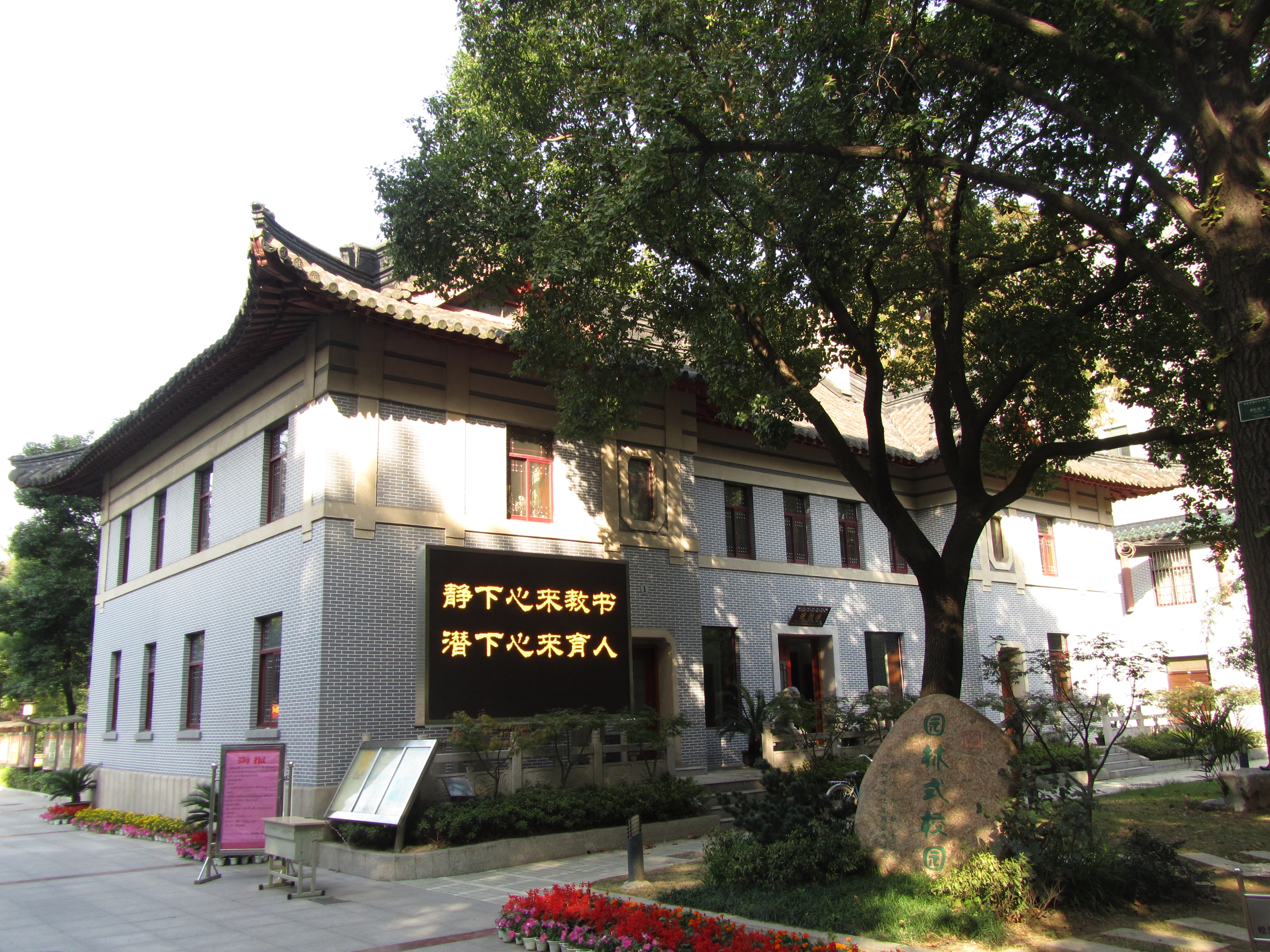 南京道胜堂旧址，今为南京市第十二中学内的约翰·马吉图书馆。